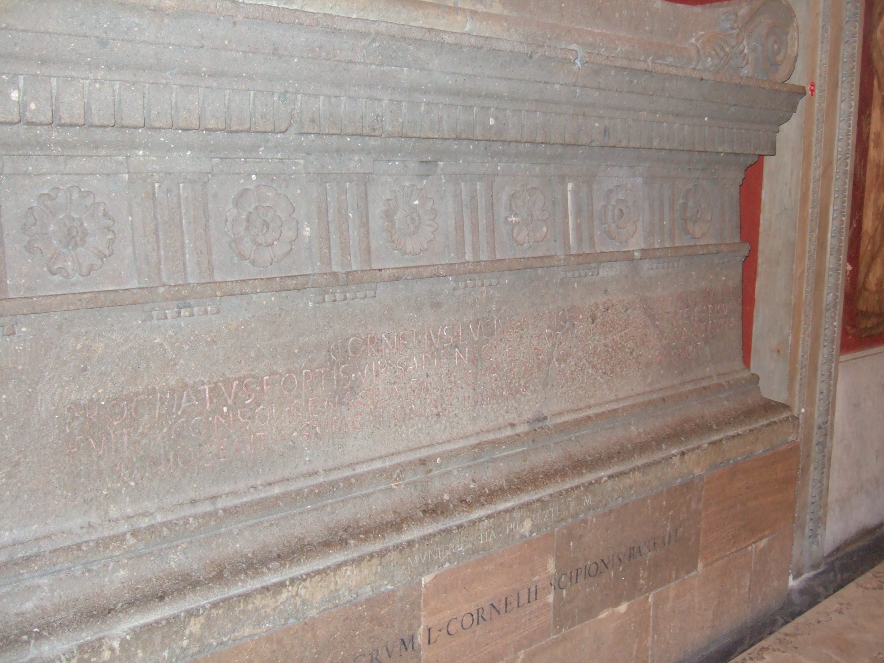 スキピオ•バルバトゥスの墓碑